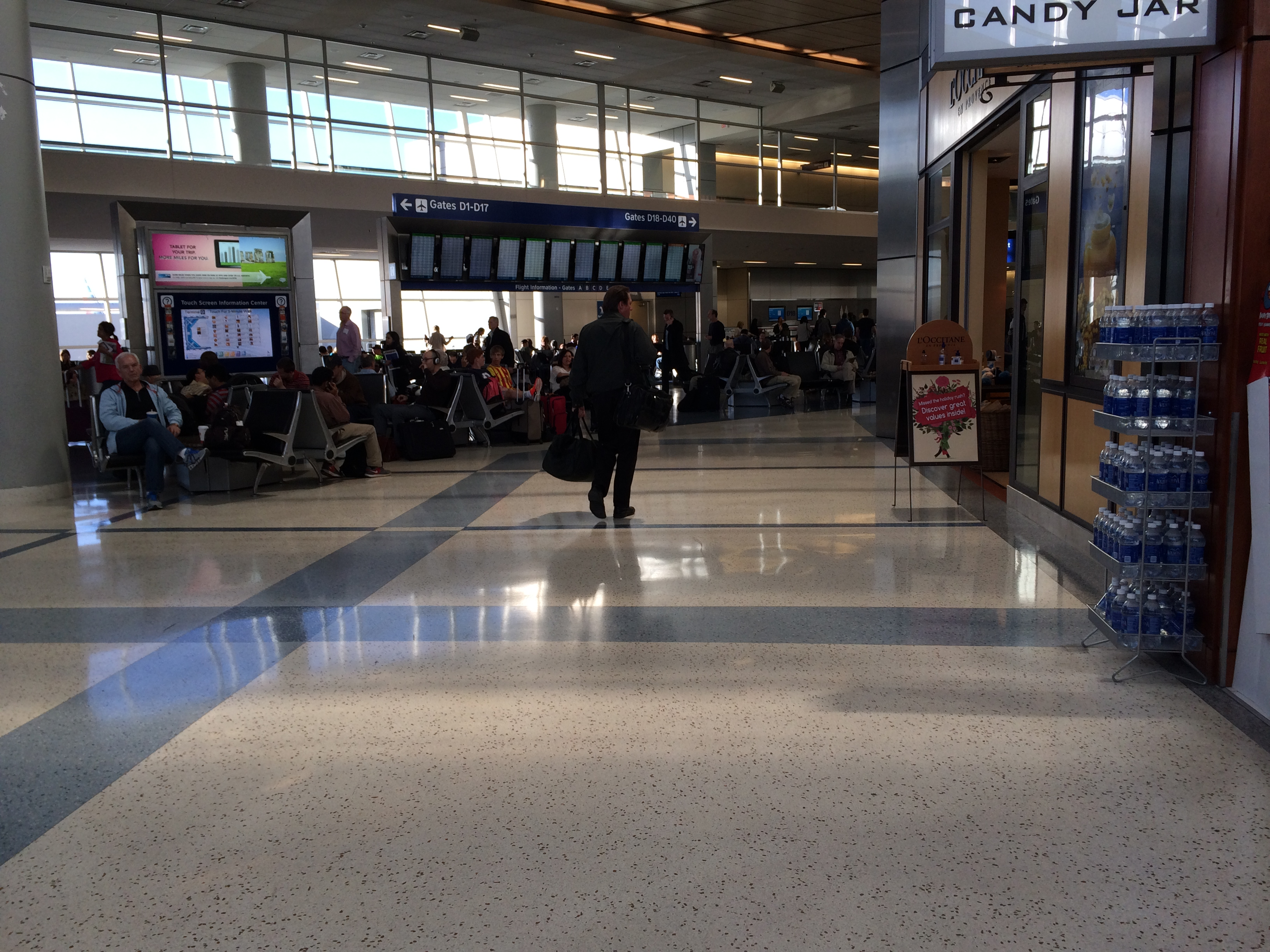 Interior de la Terminal D del aeropuerto de DFW.